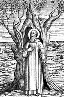 De heilige Gerlachus van Houthem voor zijn holle boom. Devotieprentje van de parochie Houthem uit eigen bezit, ca. 1860.